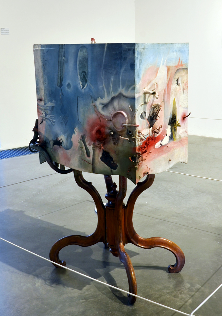 Bedřich Dlouhý, Objekt (1963), asambláž s malbou, kov, překližka, sklo, GVU v Ostravě